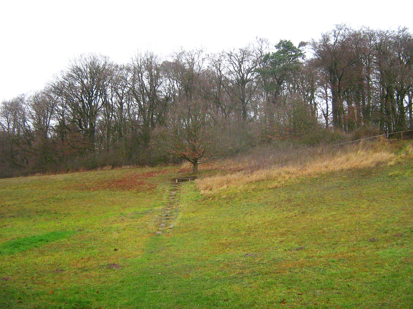 Aufgang von Süden zum Burgwall auf dem Schanzenberg bei Rothemühl, Landkreis Uecker-Randow.